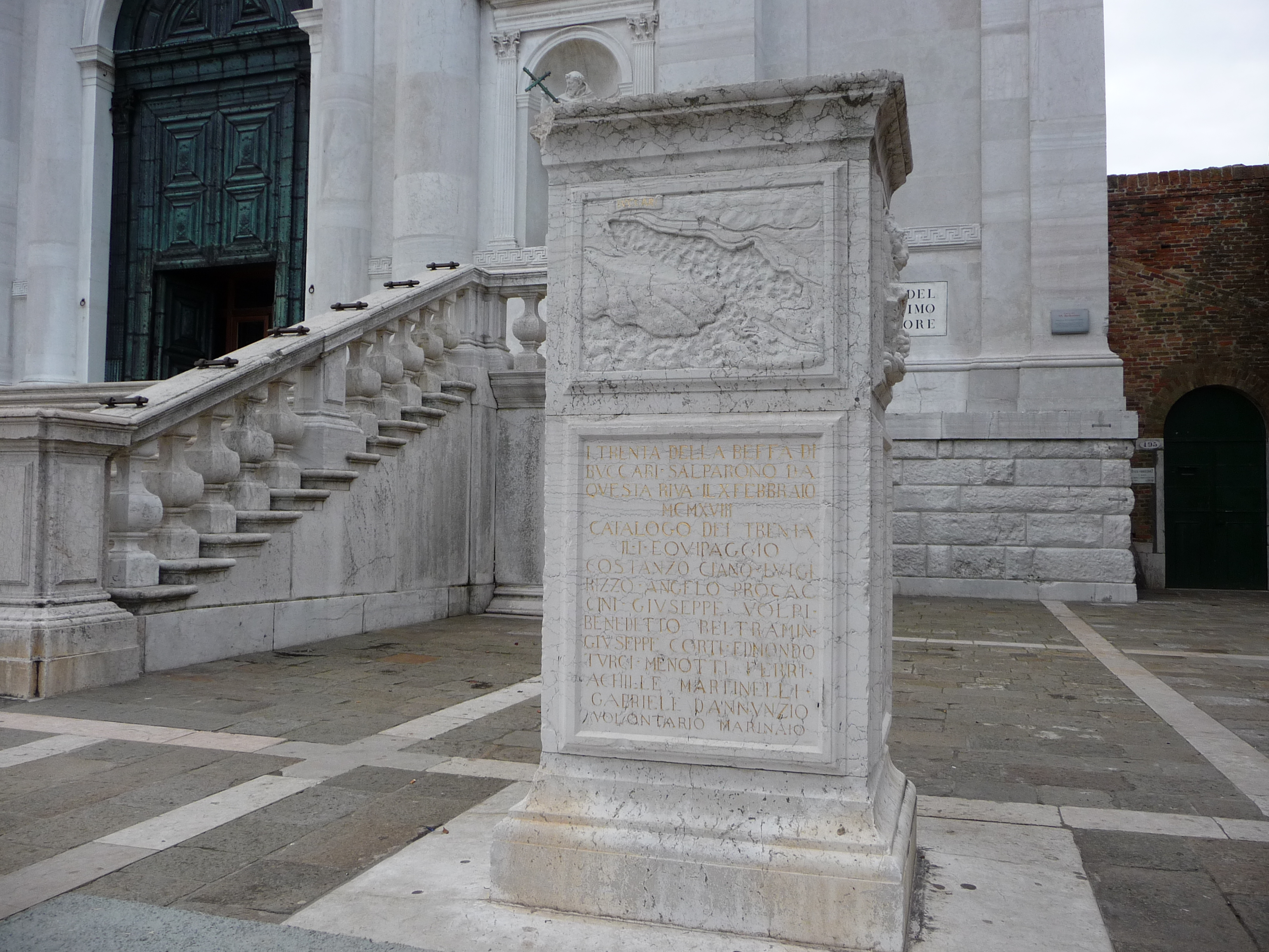 Cippo commemorativo della Beffa di Buccari a Venezia sul sagrato della chiesa del Redentore